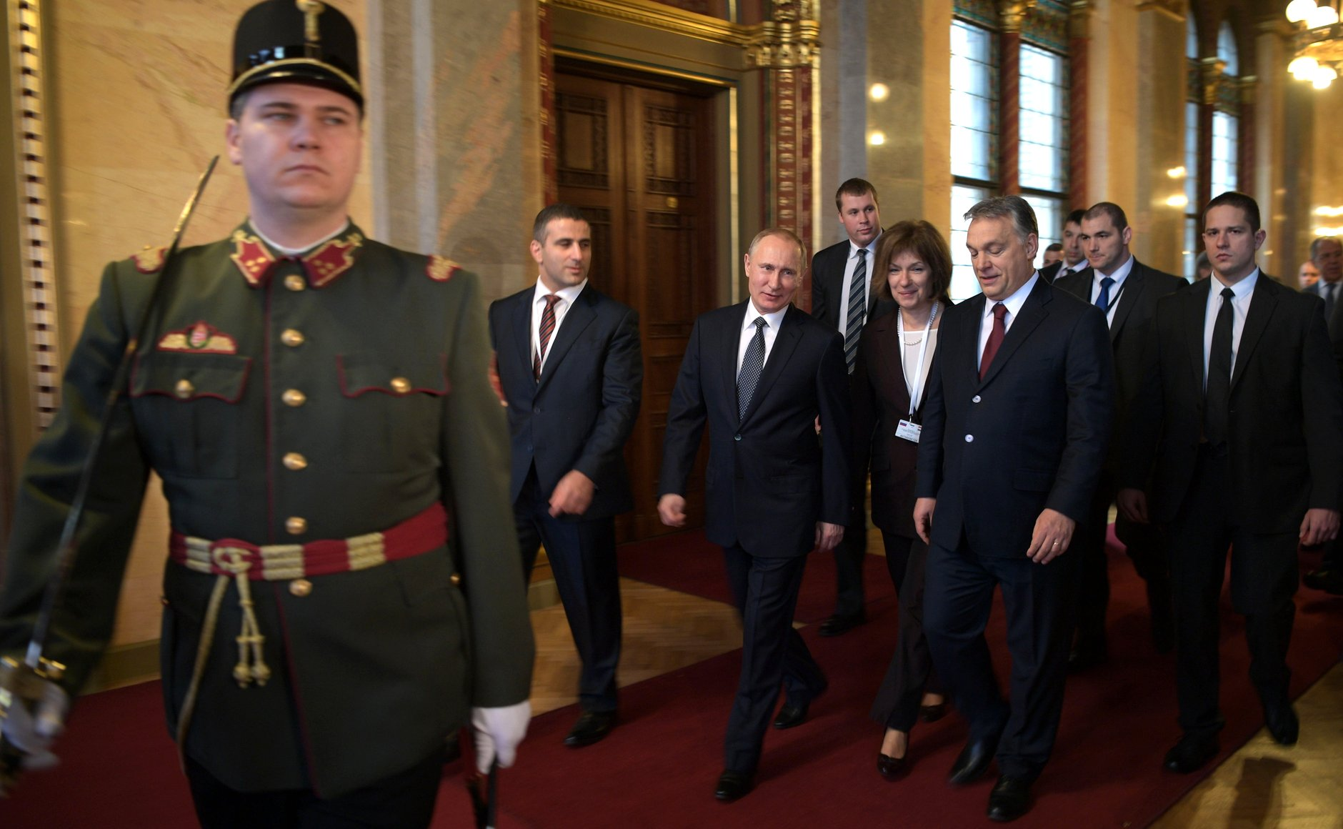 Президент России Владимир Путин и Премьер-министр Венгрии Виктор Орбан перед началом российско-венгерских переговоров